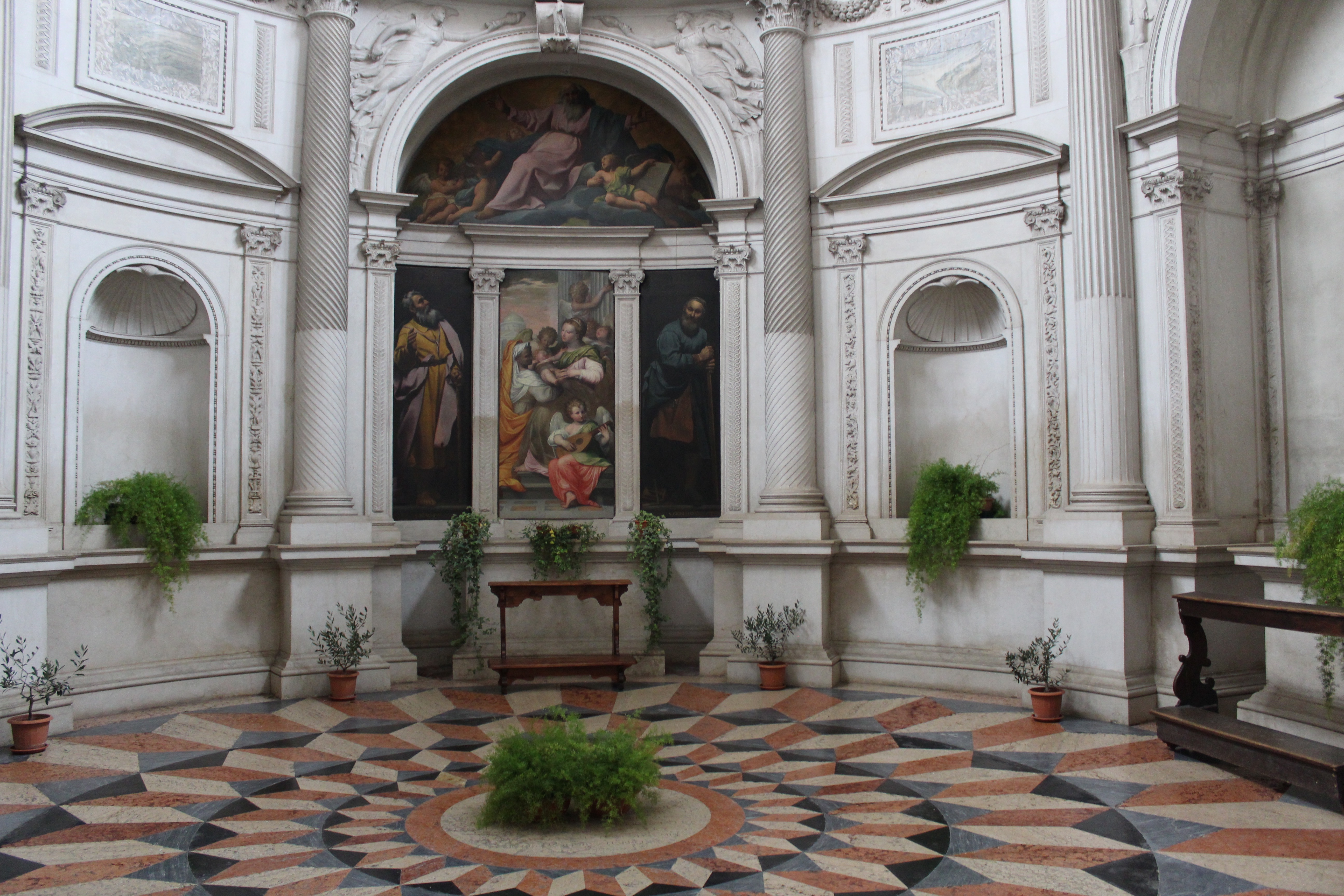 Interno della cappella Pellegrini, nella chiesa di San Bernardino (Verona)